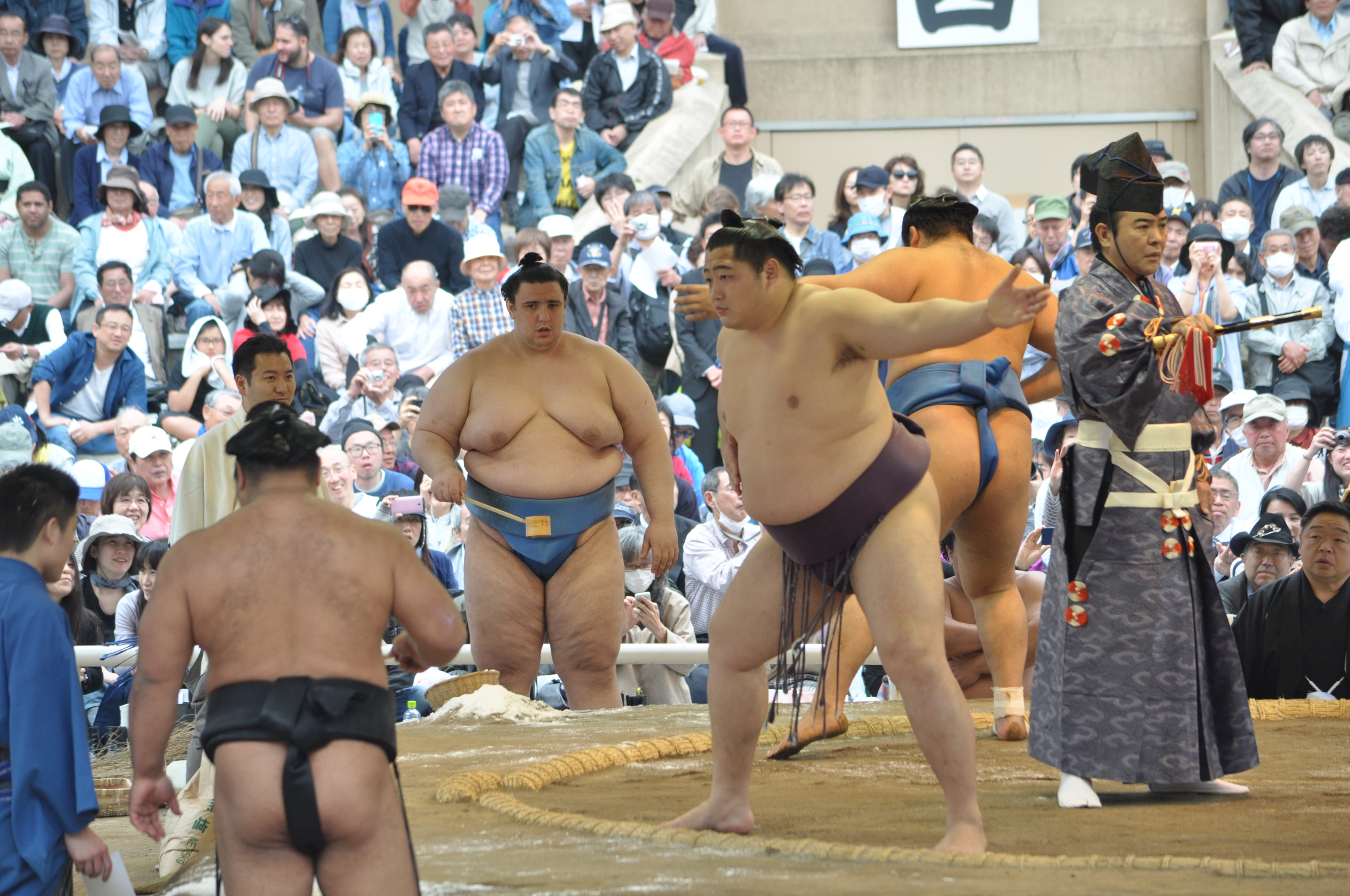 遠藤 聖大